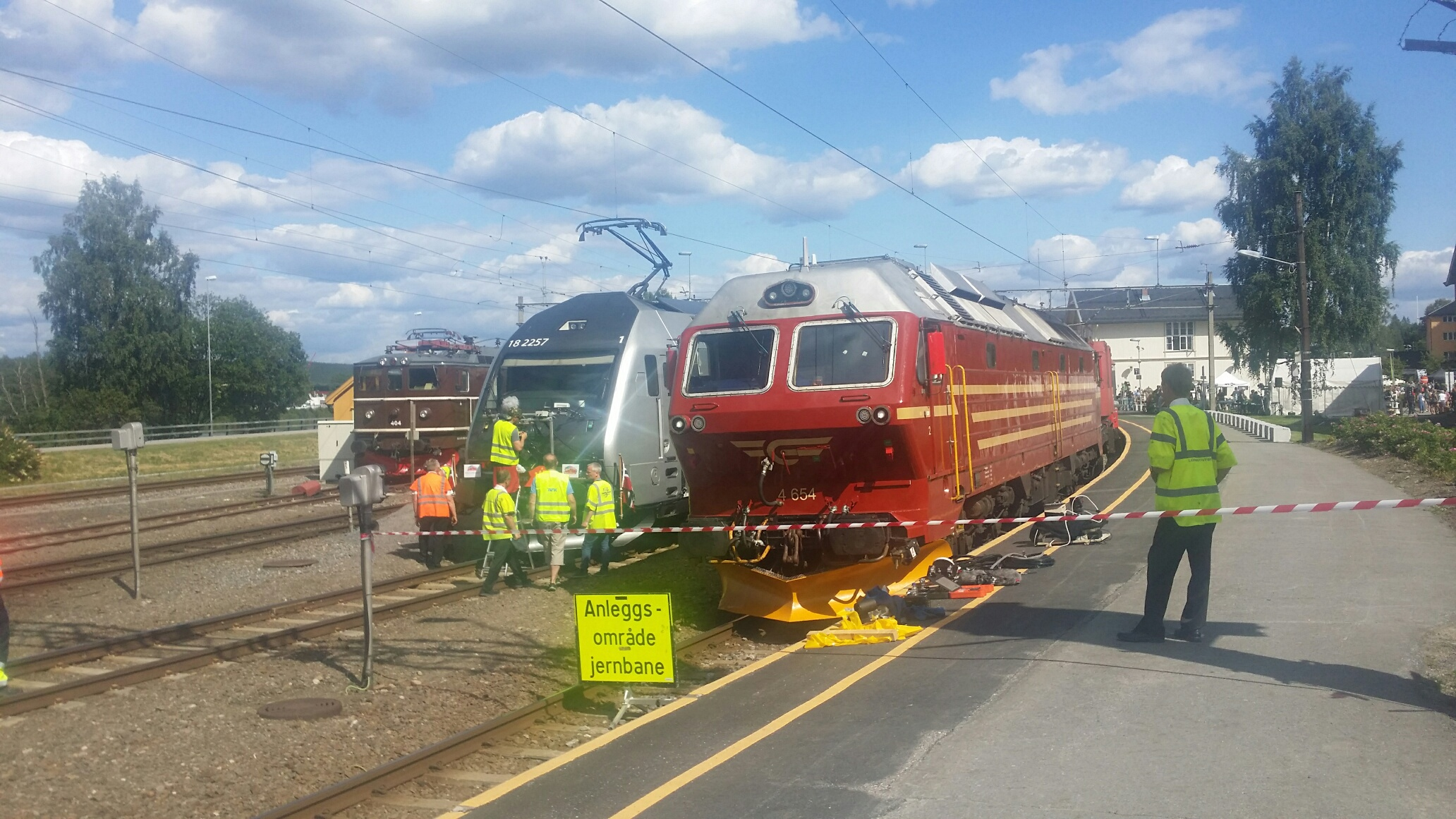 Kongsvinger 20. juli 2017